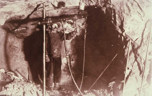 Gruvearbeider med bor og karbidlampe. 1913 NM.F.008007-00023